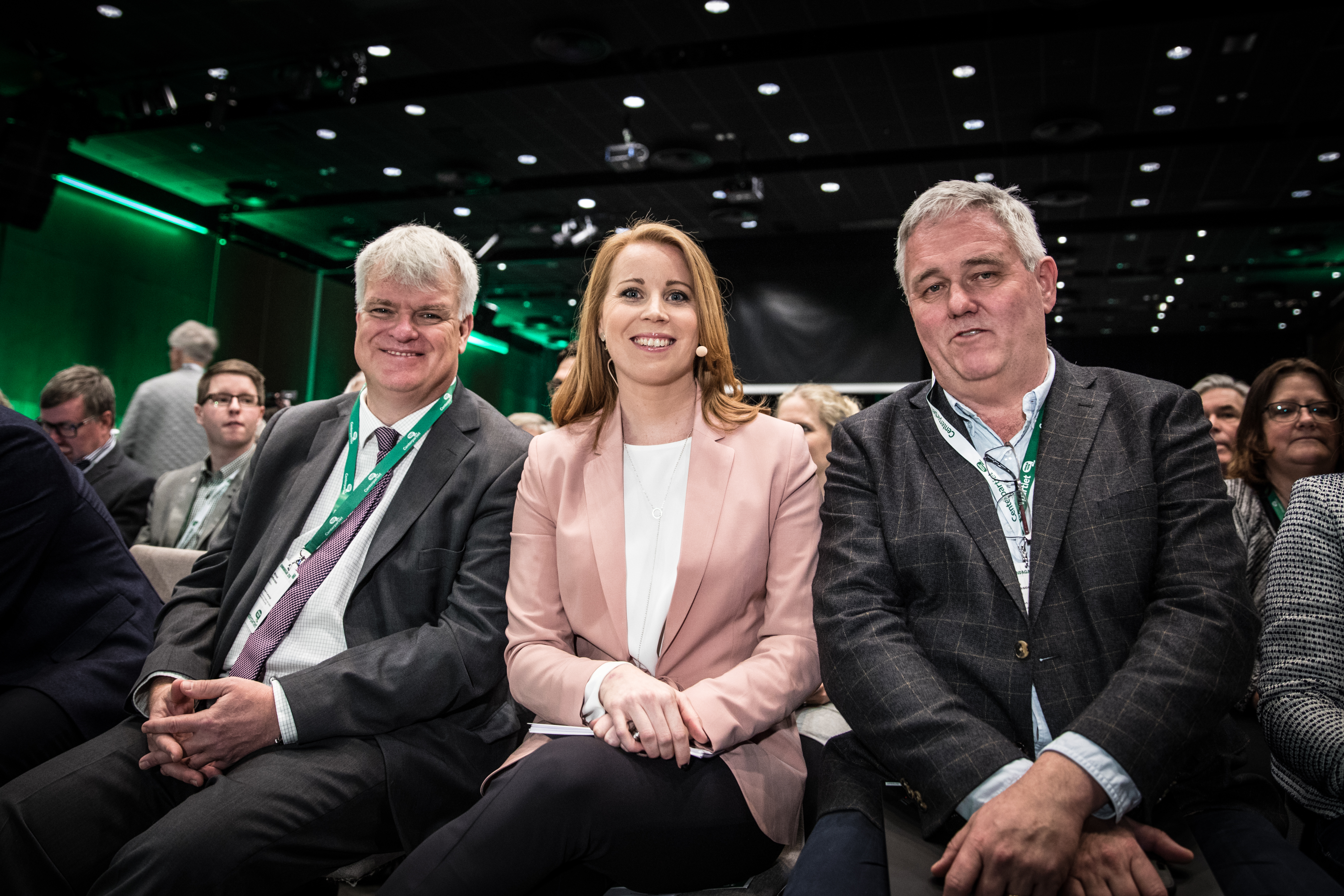 Annies tal på kommundagarna 2018